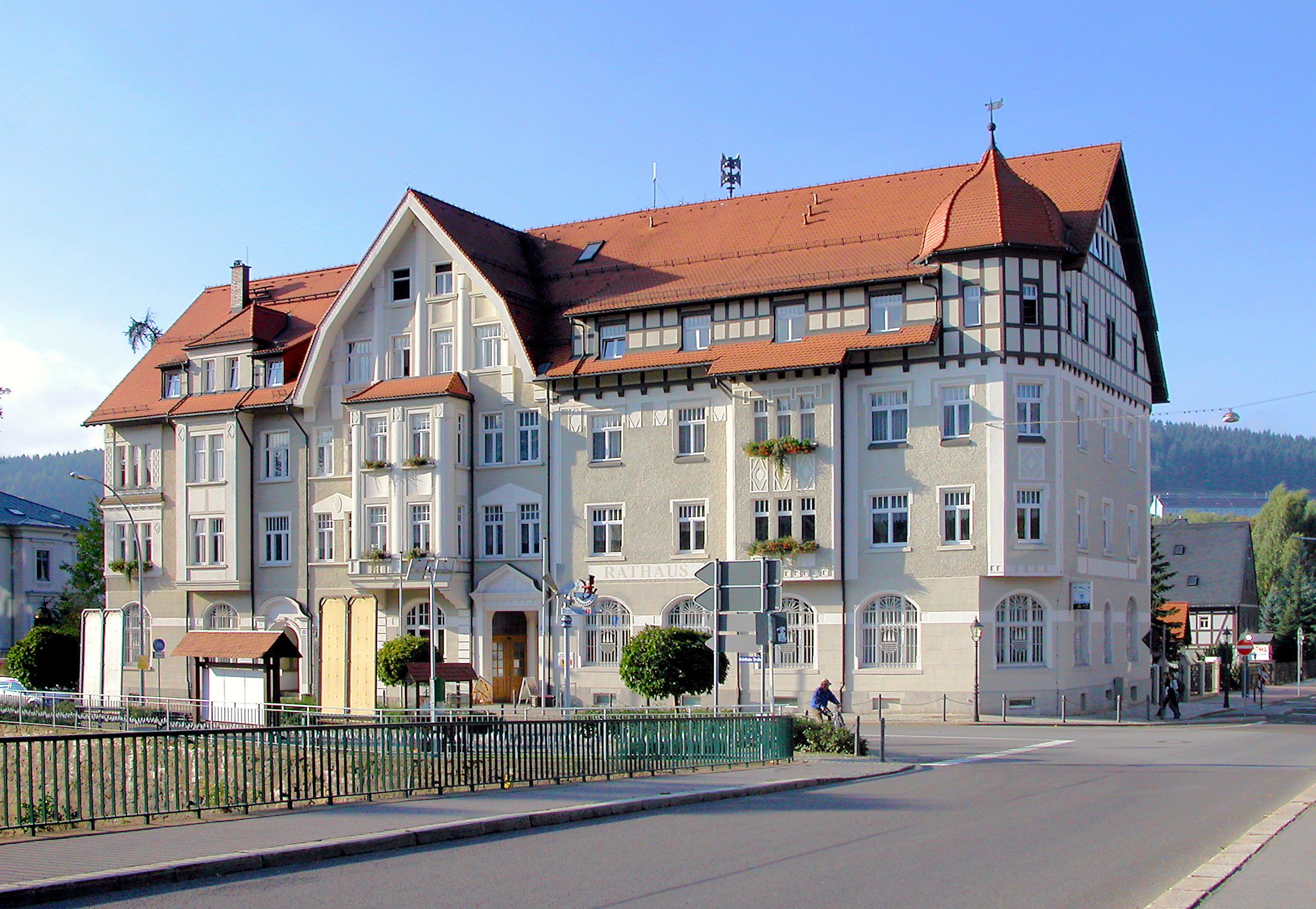 25.09.2006 09526 Olbernhau, Grünthaler Str. 28/30 (GMP: 50.659488,13.340212): Rathaus, erbaut 1907/1908, zweiter Bauabschnitt 1911. Entwurf und Ausführung durch den Olbernhauer Baumeister Arthur Einhorn. Bauherren waren Julius Einhorn und Karl Friedrich Steinert. Sicht von Norden. [DSCN11748.TIF]20060924035DR.JPG(c)Blobelt